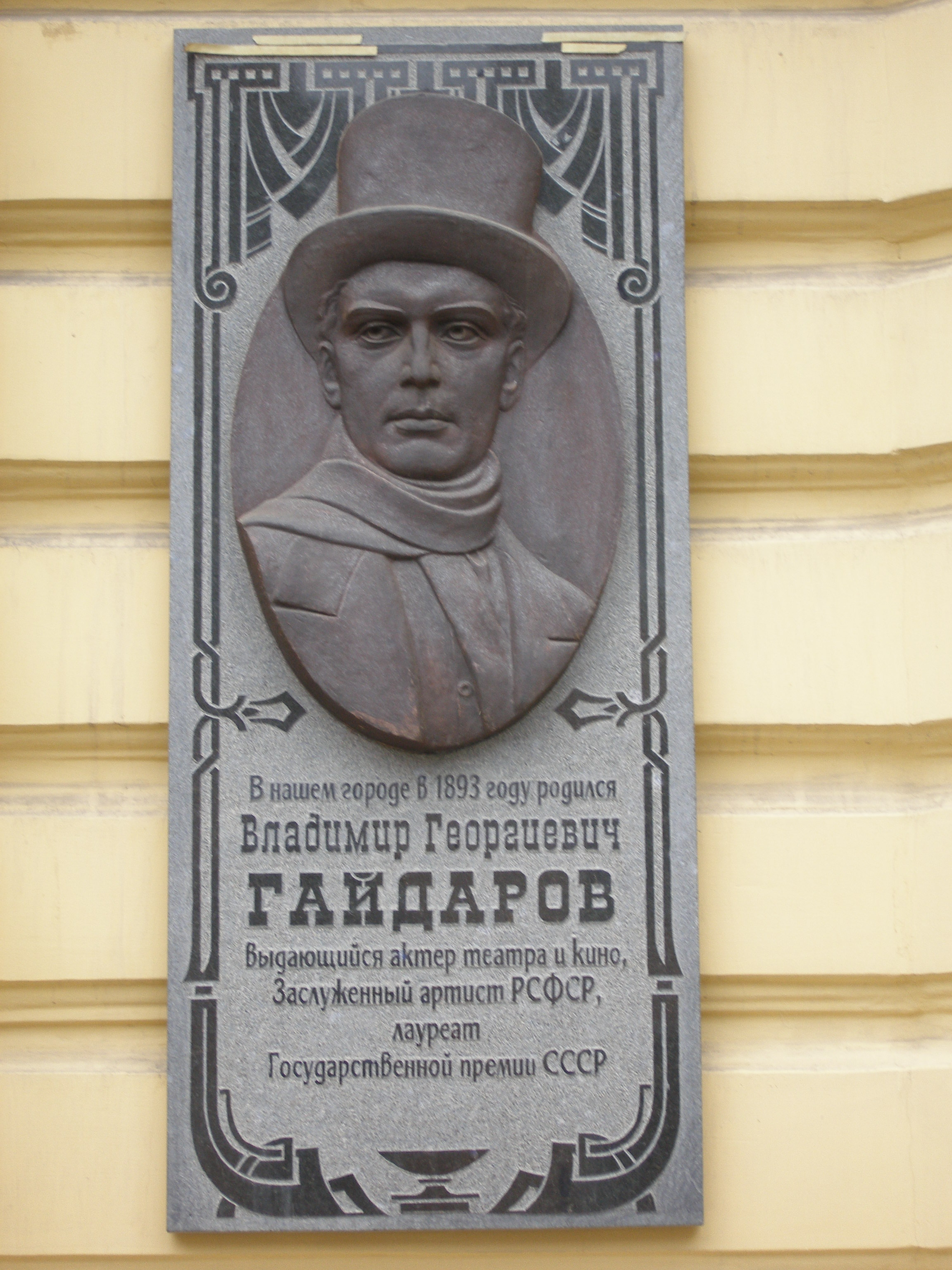 В нашому місті в 1893 народився В.Г.Гайдаров